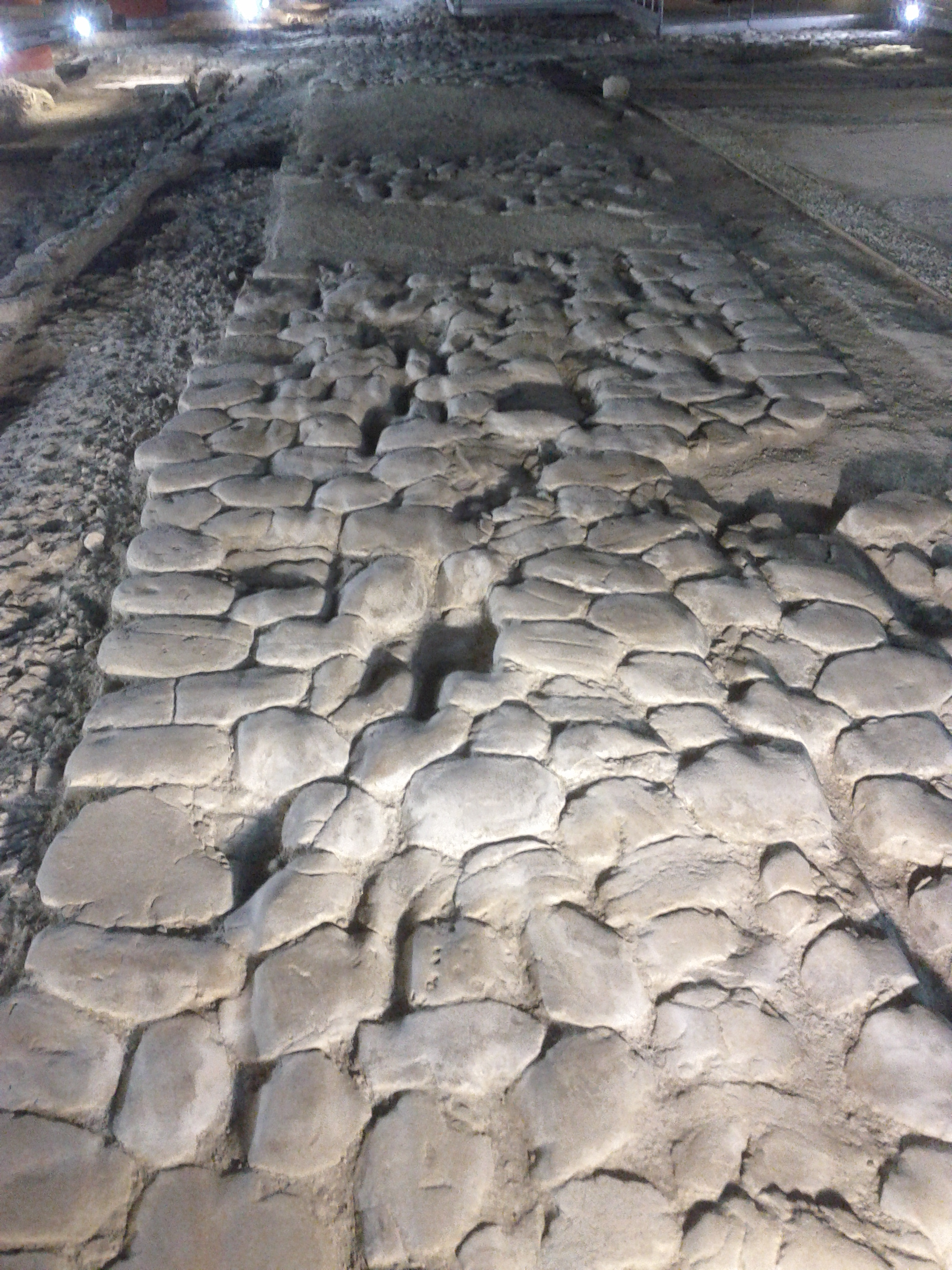 Area archeologica la Fenice di Senigallia - 20120121